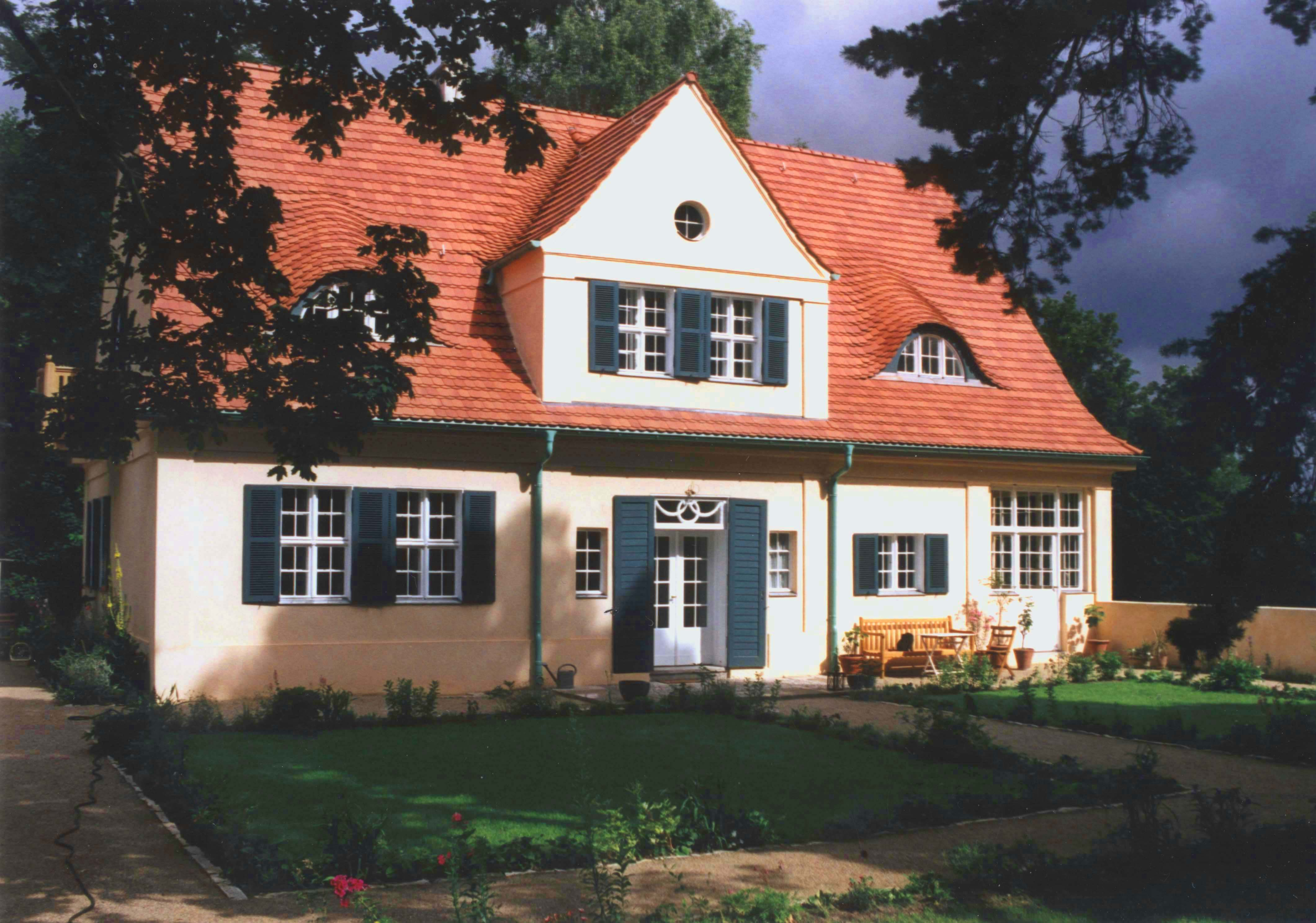 Haus Riehl 1907 Erstling von Ludwig Mies, Südostseite mit Hauseingang, 2001 nach der Instandsetzung, Rekonstruktion und Innenausbau von Folkerts Architekten 1998 bis 2000